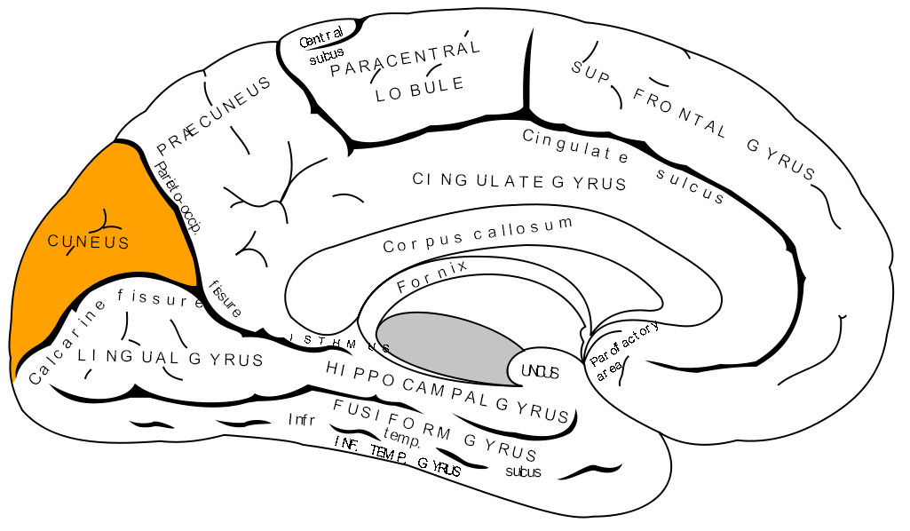 Cuneus.